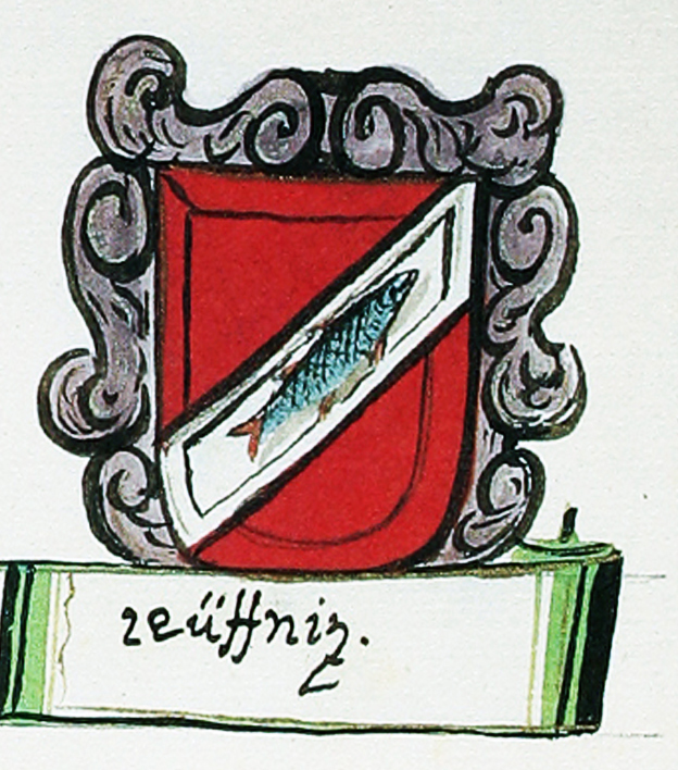 Grb Ribnice